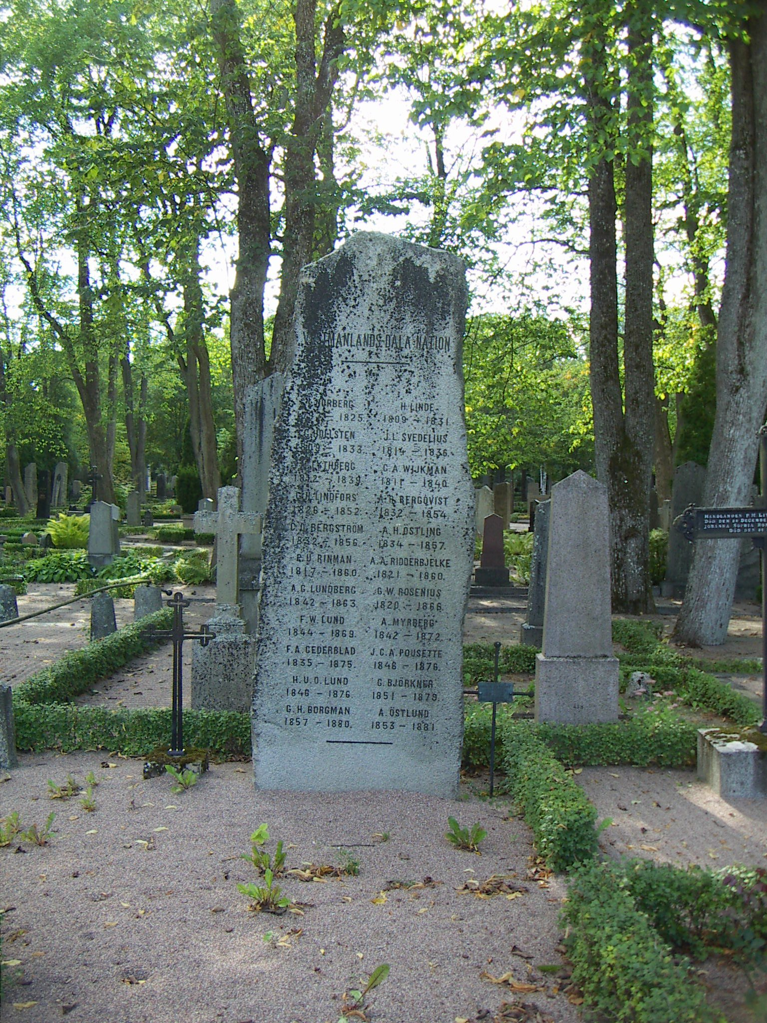 Västmanland-Dala nations gamla gravsten på gamla kyrkogården i Uppsala.